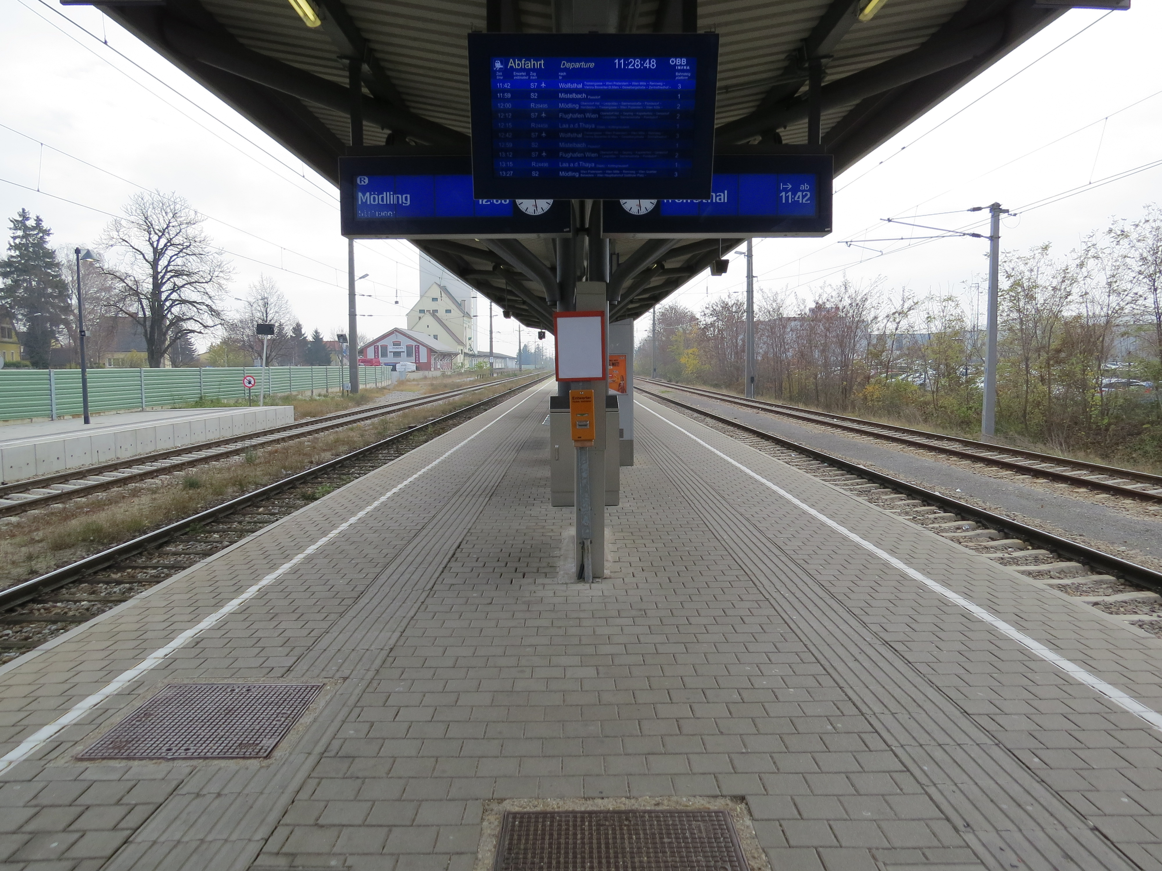 Station platforms at Bahnhof Wolkersdorf